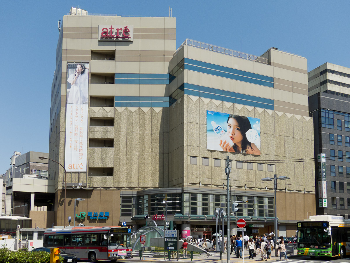 JR東日本山手線恵比寿駅。